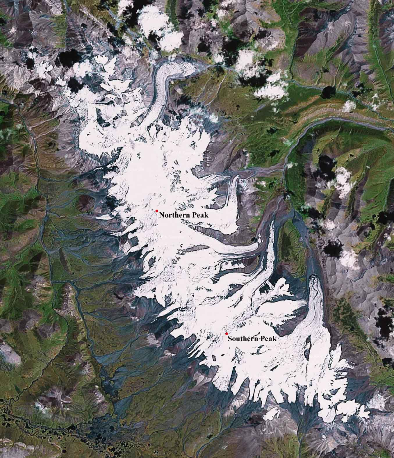 L'Amnye Machen (province du Qinghai, Chine) vu de l'espace